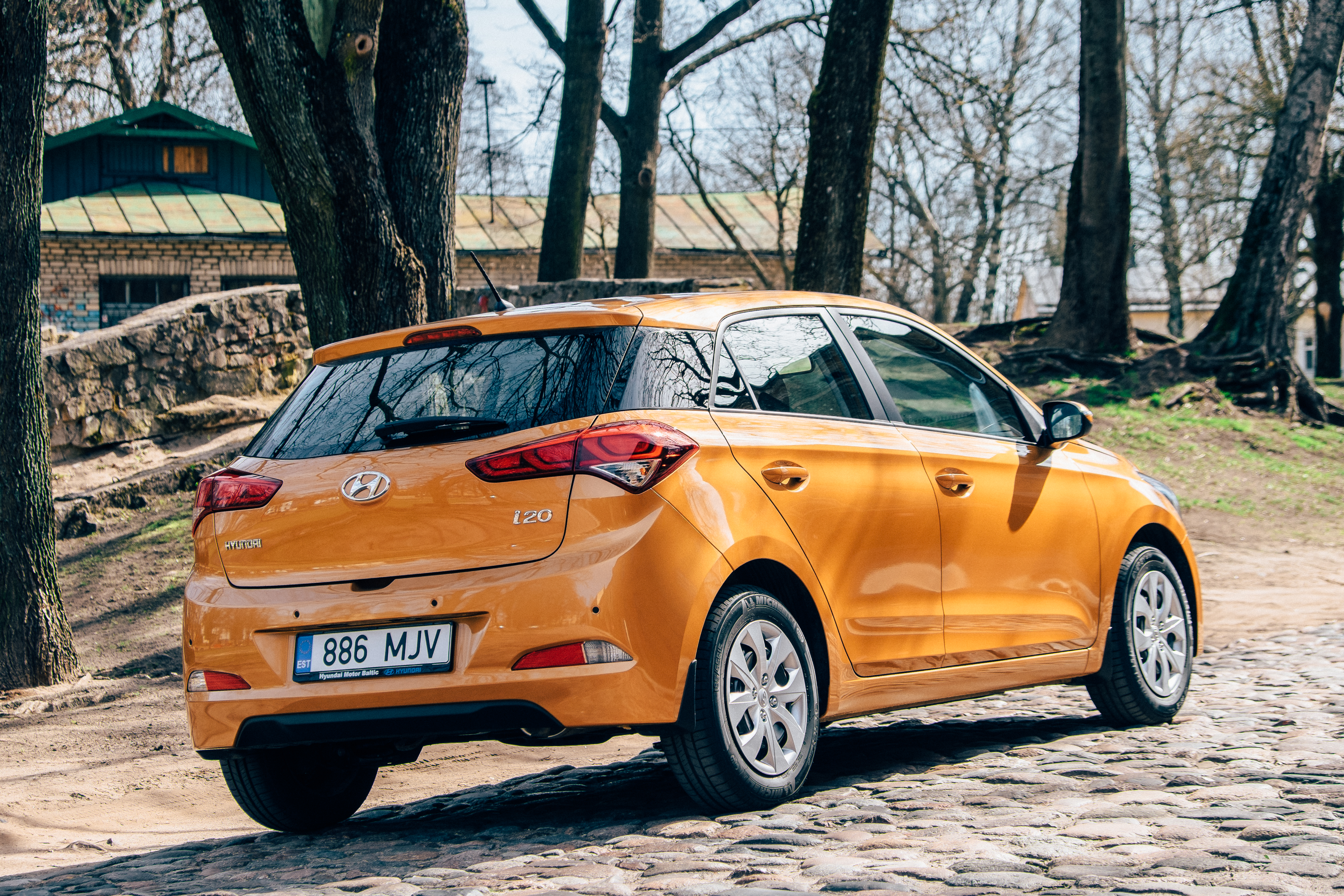 Hyundai i20